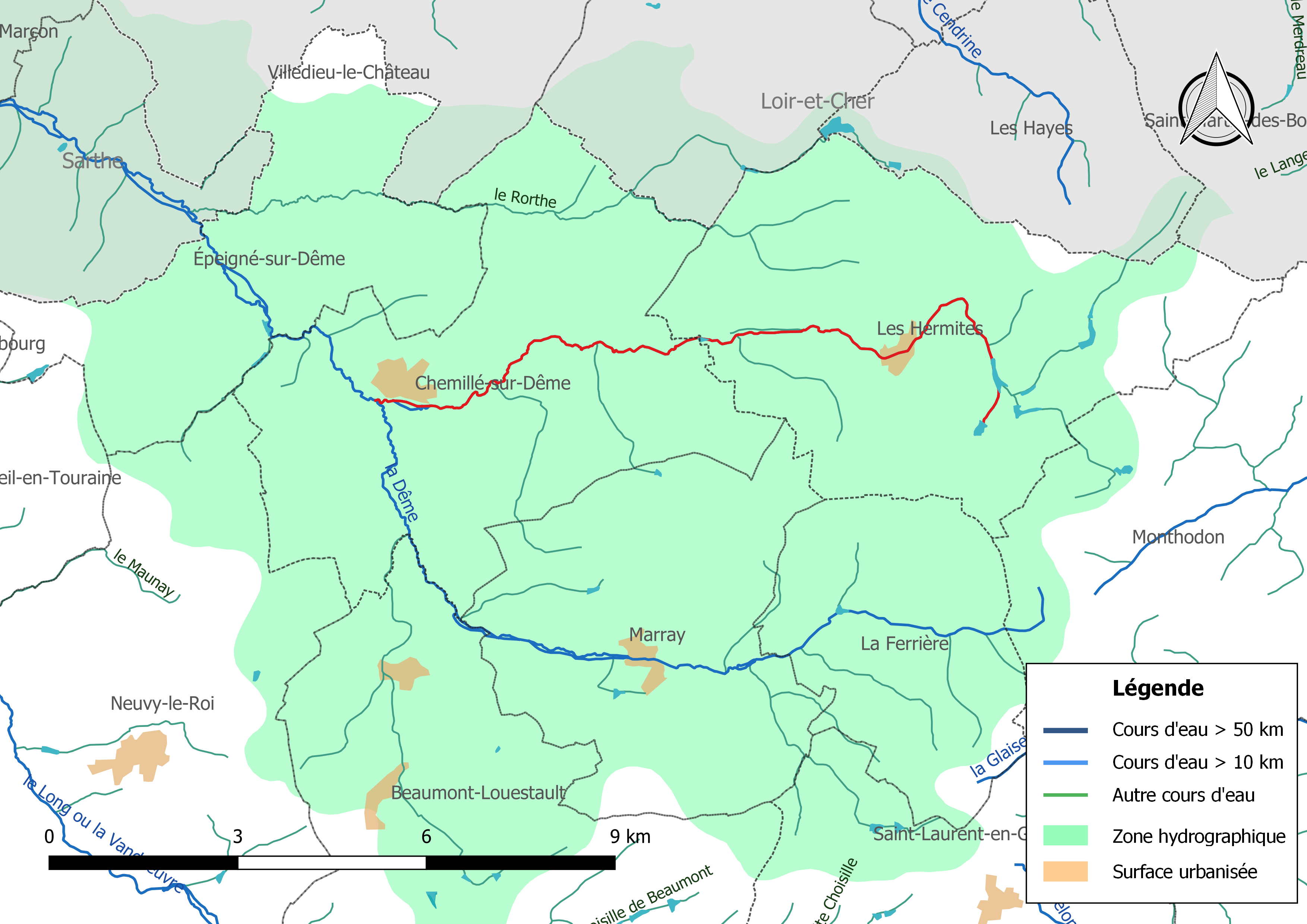 Carte du cours d'eau « la Dêmee » et de son bassin versant.